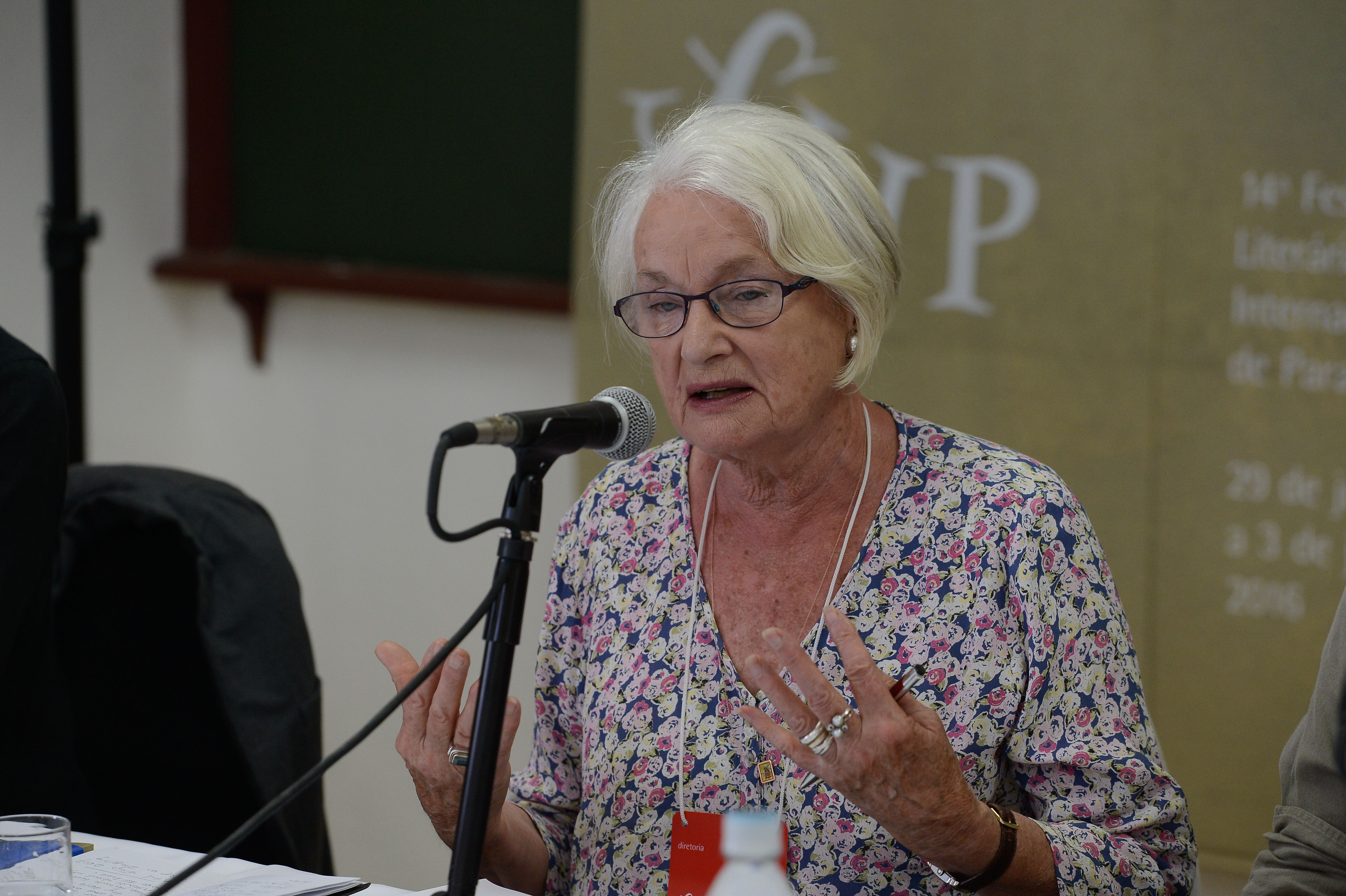 Paraty (RJ) - A inglesa Liz Calder, presidente do Conselho Diretor e uma das idealizadoras da Festa Literária Internacional de Paraty (Flip), fala durante entrevista de encerramento do evento (Tomaz Silva/Agência Brasil)